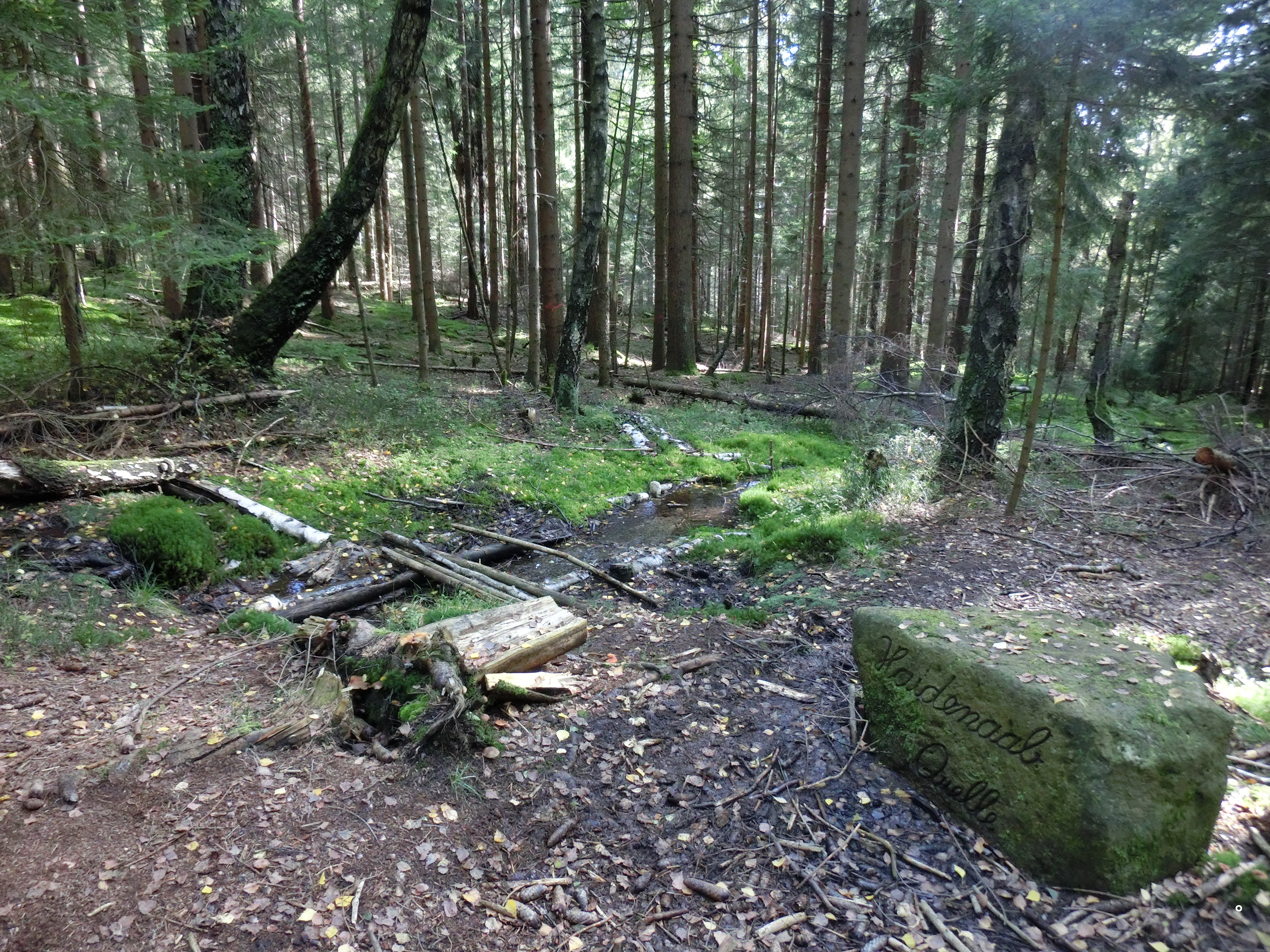 Quelle der Haidenaab